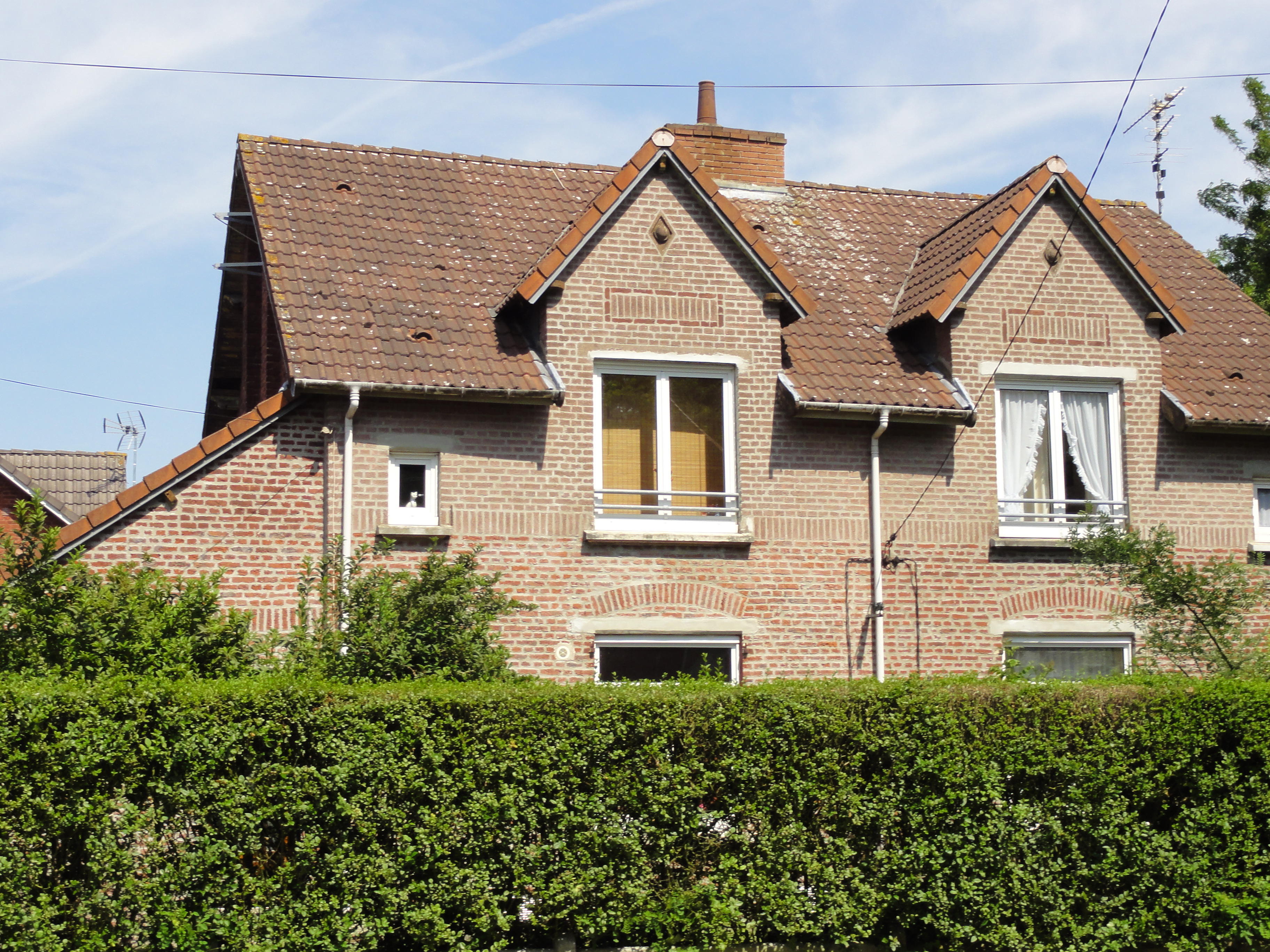 Cités de la Fosse n° 5 - 5 bis de la Compagnie des mines de Liévin, Liévin, Pas-de-Calais, Nord-Pas-de-Calais, France.